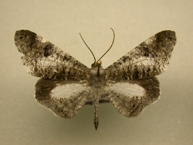 Macrosoma conifera